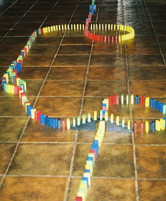 A example of dominos